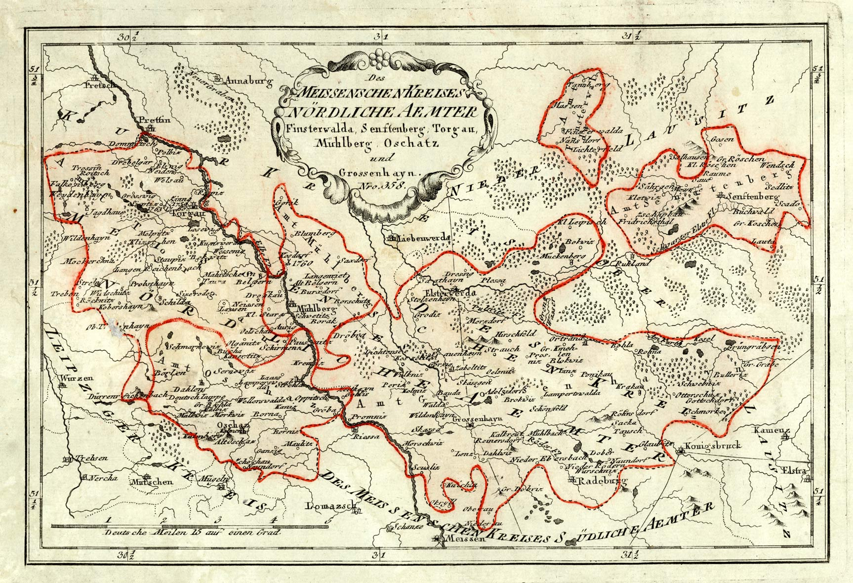 Des Meissenschen Kreises Noerdliche Aemter Finsterwalda, Senftenberg, Torgau, Muehlberg, Oschatz und Grossenhayn. Nro. 358. Kupferstich, 32 × 21 cm